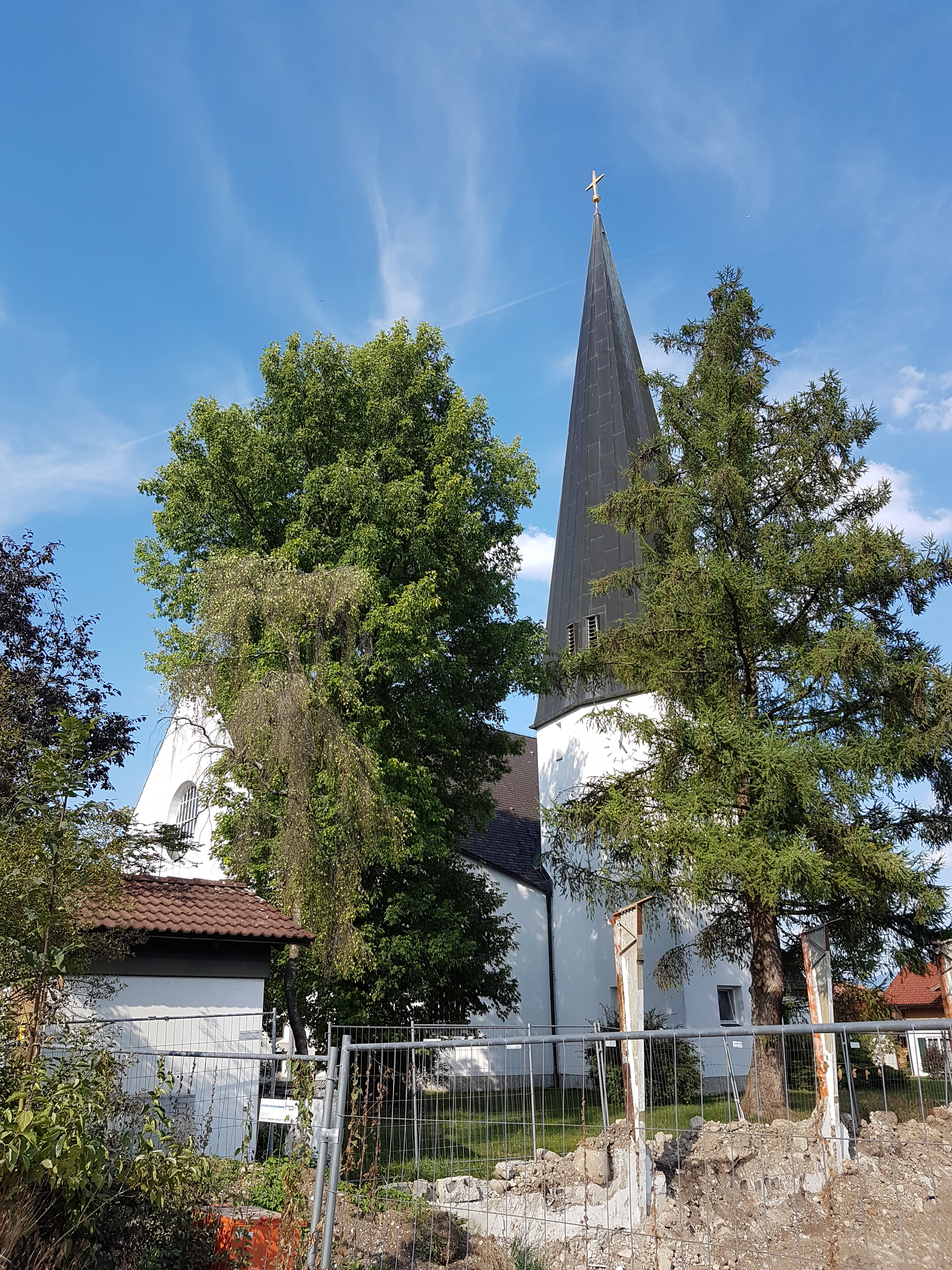 Großweil, neue Pfarrkirche St. Georg